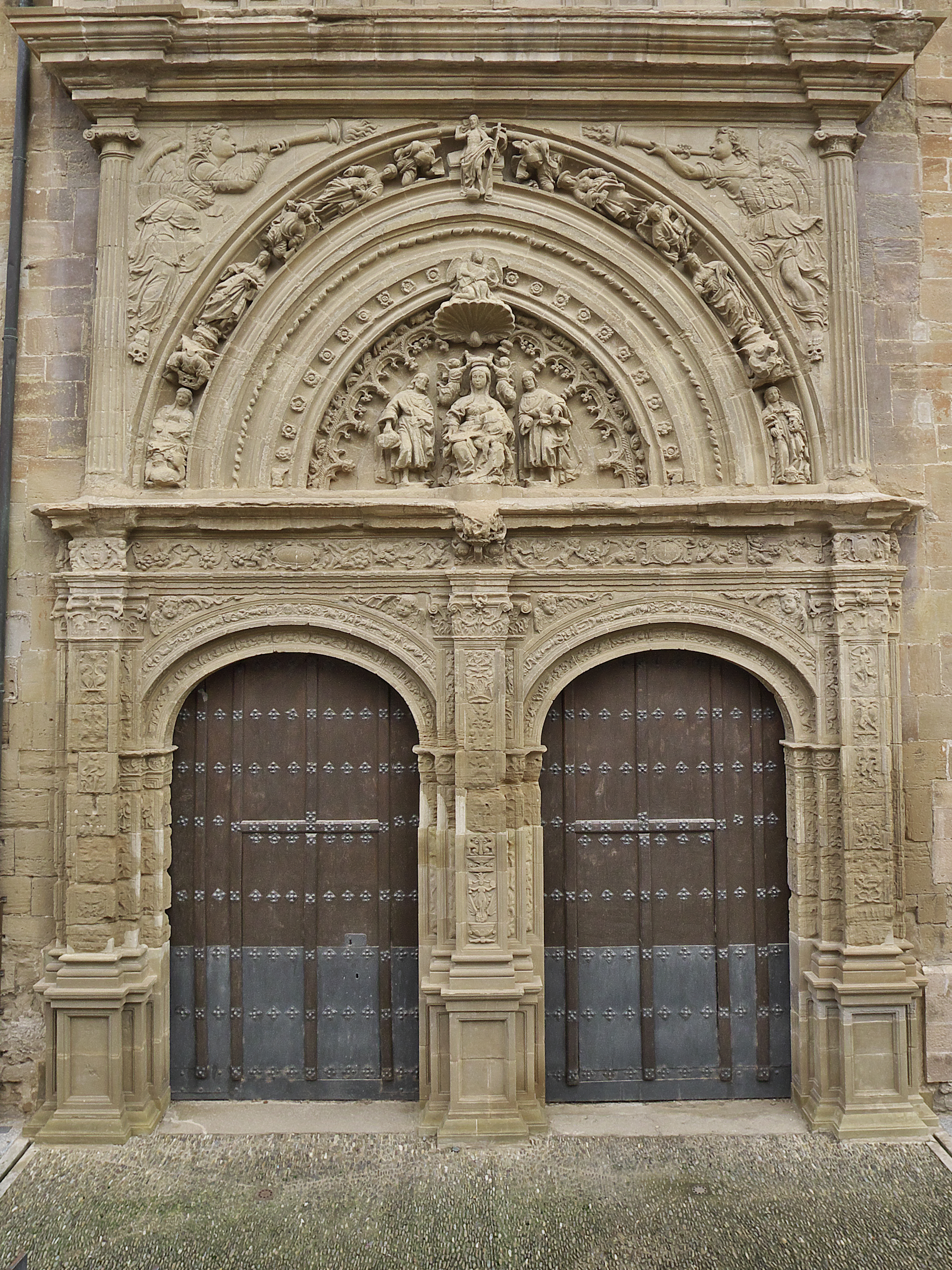 También conocida como Puerta de Fosal. Muy bien trabajada, dentro del siglo XVI, presenta dos cuerpos con estilismos diferentes. El superior dedicado a la Coronación de la Virgen acompañada por San Emeterio y San Celedonio, plateresca (1520), y el inferior pleno renacentista (1559).